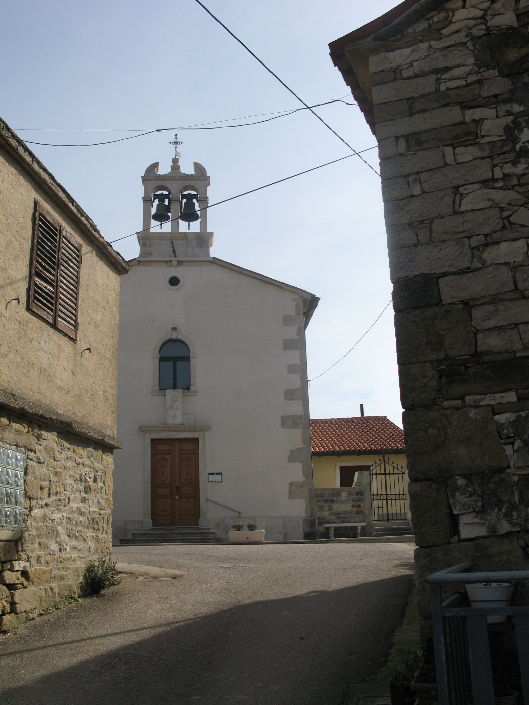 Sveti Peter This media shows a cultural heritage object of Slovenia with the EŠD number: 3803